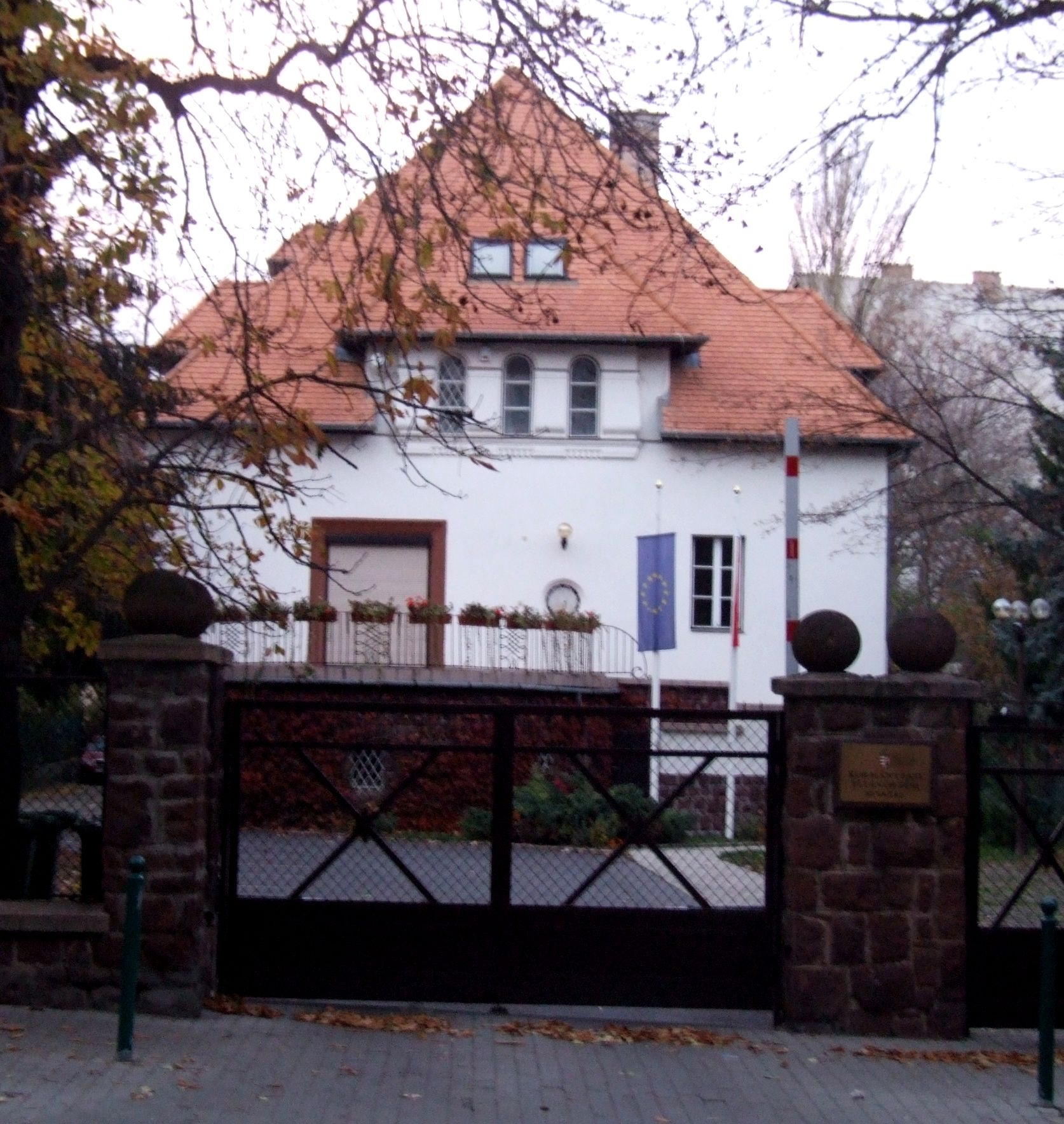 Rózsahegyi Kálmán villája. Budapest XII. kerület, Tartsay Vilmos utca 13. - Most Kormányzati Ellenőrzési Hivatal. This is a photo of a monument in Hungary, Identifier: 8301 Object location47° 29′ 32.51″ N, 19° 01′ 17.17″ E